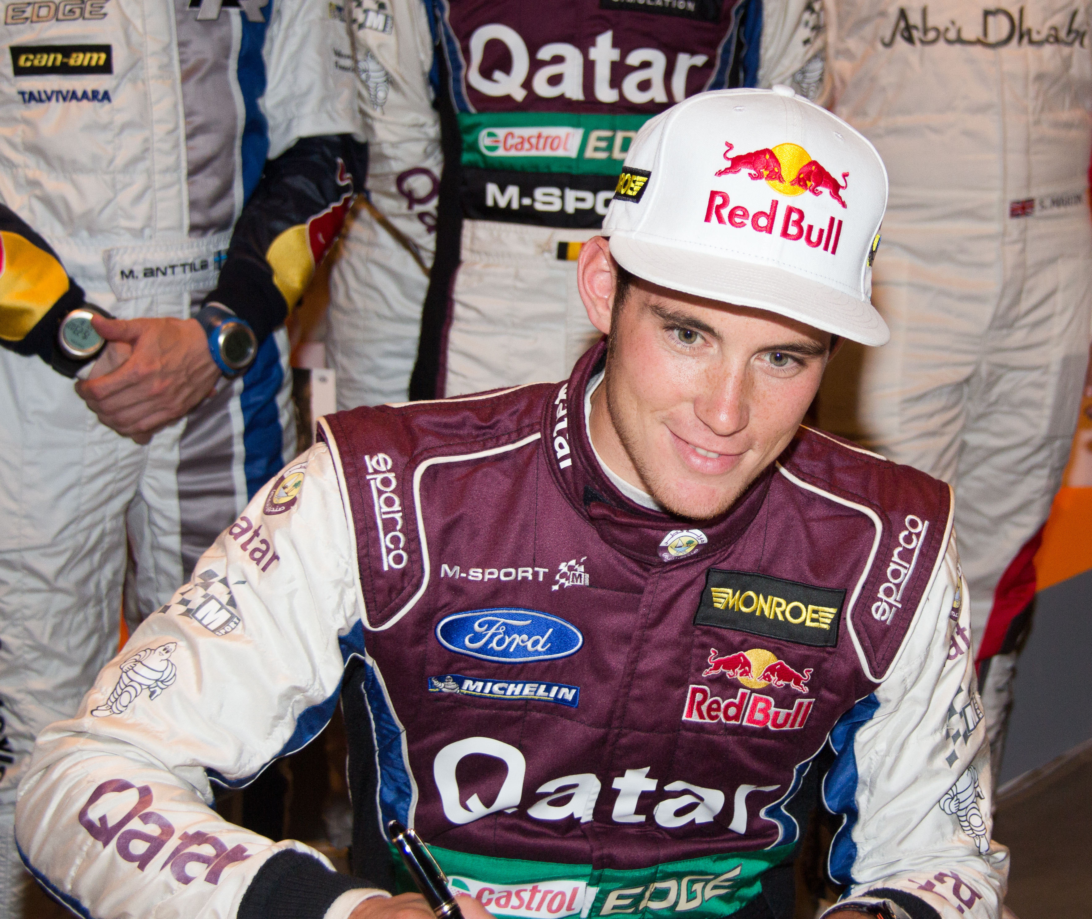 ADAC Rallye Deutschland 2013 - Empfang der Stadt Köln - Thierry Neuville trägt sich in das Gästebuch der Stadt Köln ein.